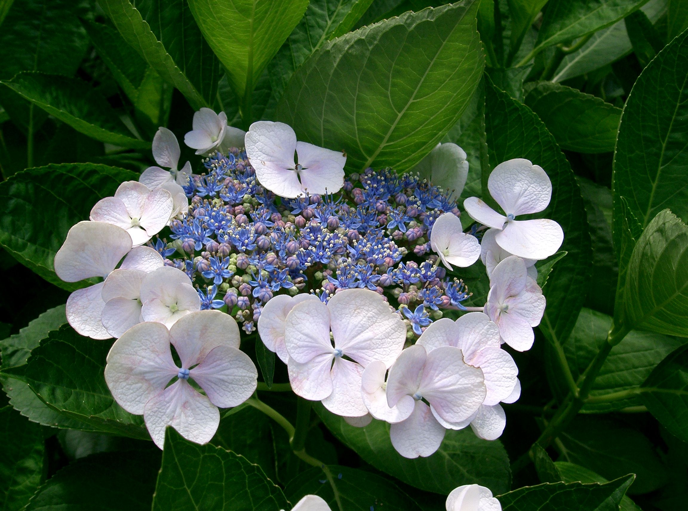 Hydrangea macrophylla f. normalis